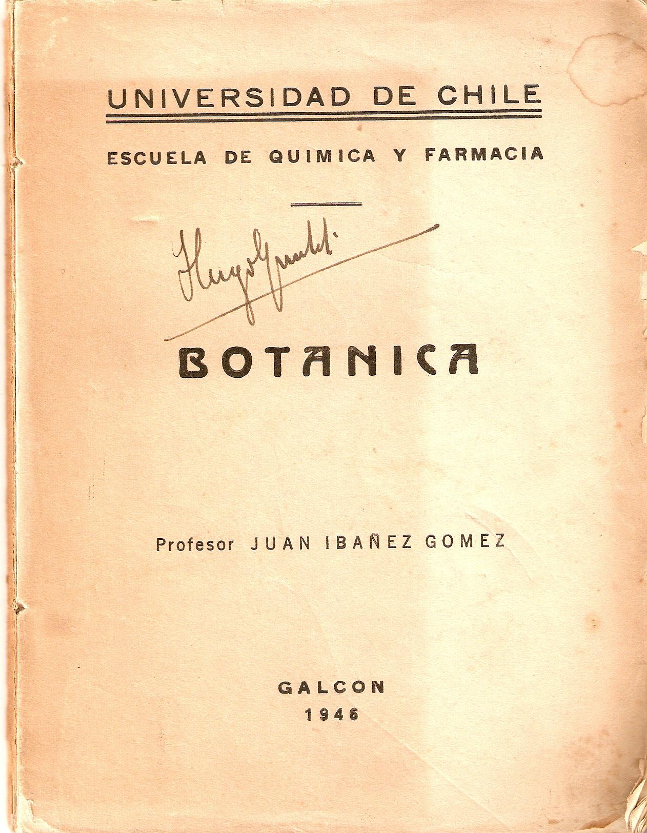 Firma de Hugo Gunckel Lüer sobre un libro de Juan Ibañez